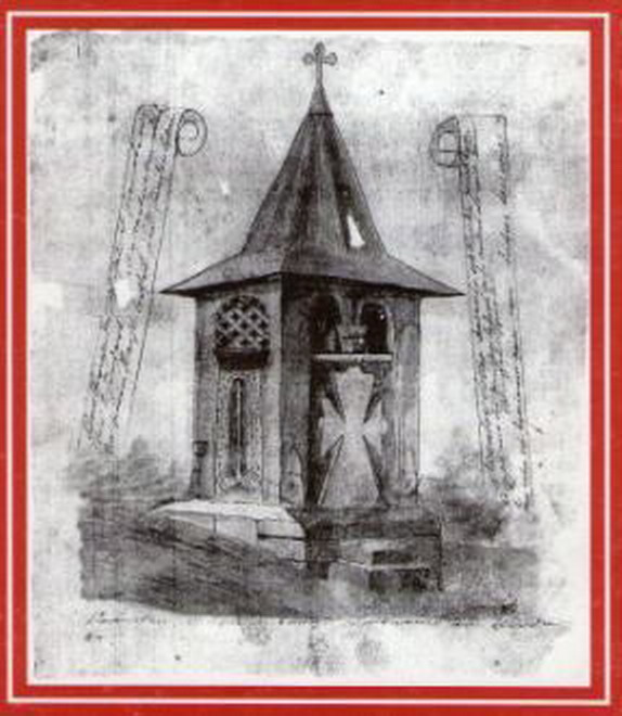 Capela Doamnei Stanca la mormȃntul lui Mihai Viteazul, Turda (reconstituire)